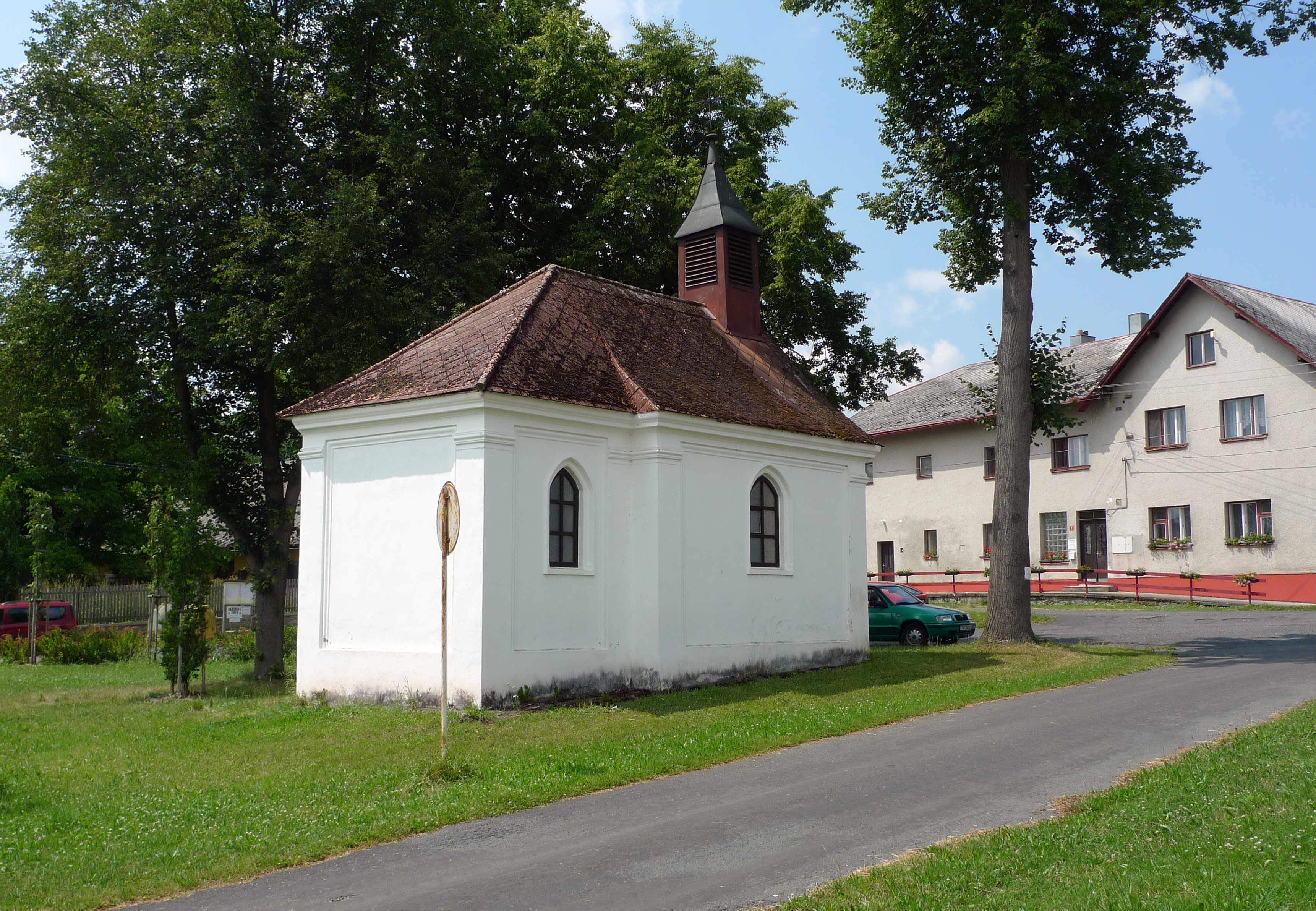 Dubová Lhota, součást obce Janovice nad Úhlavou, okres Klatovy, Česká republika - kaplička.